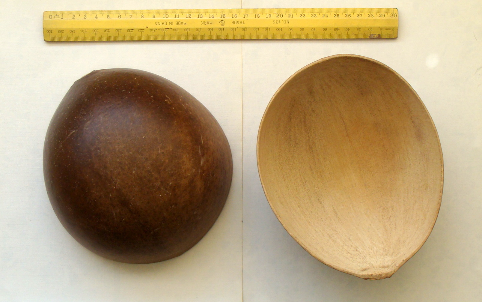 Totumas o taparas, recipientes hechos con la cáscara del fruto del totumo o taparo (Crescentia cujete)